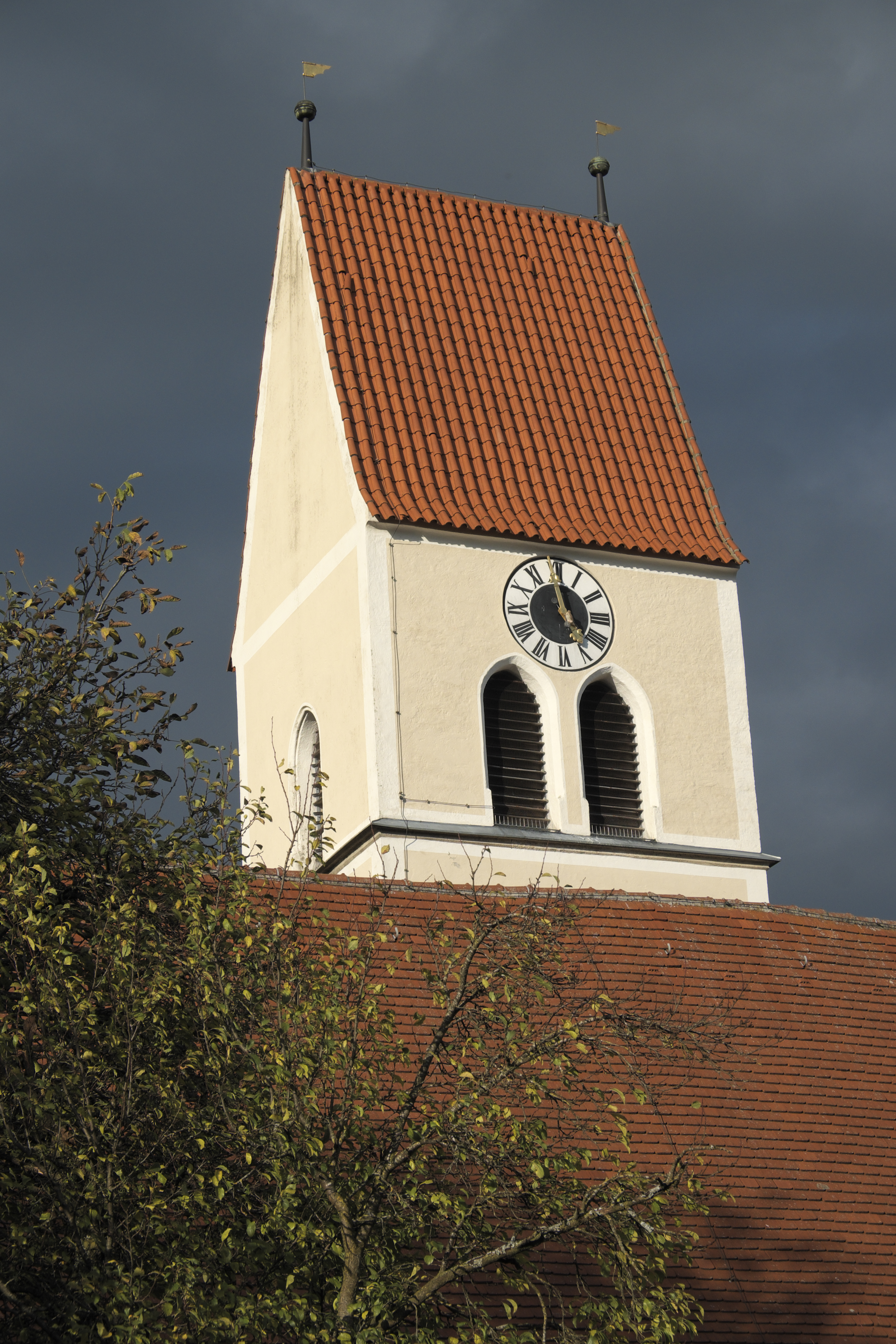 Katholische Filialkirche Mariä Himmelfahrt in Lampferding (Tuntenhausen) im Landkreis Rosenheim (Bayern/Deutschland), Satteldachturm